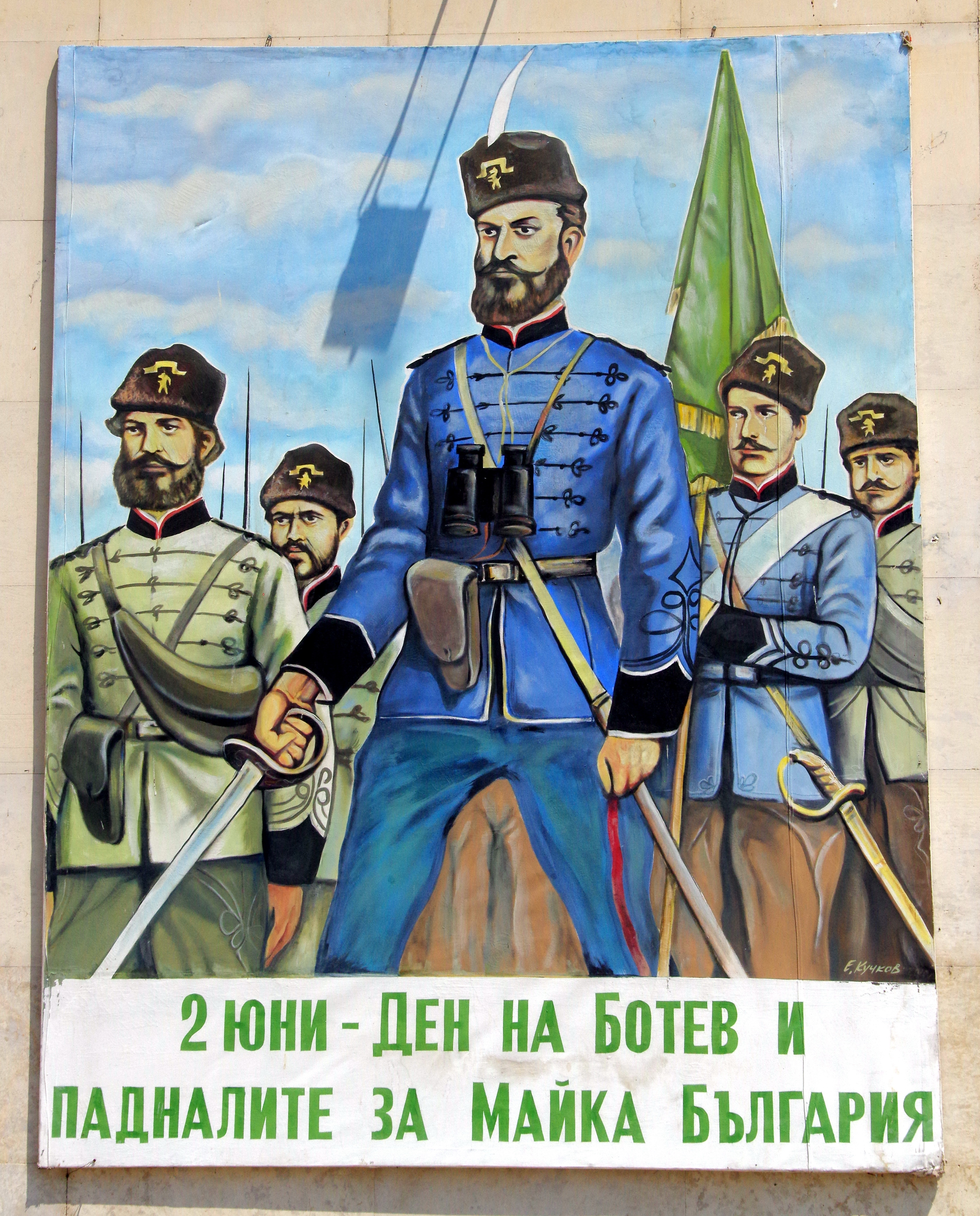 5.6.17 2 Mezdra 06